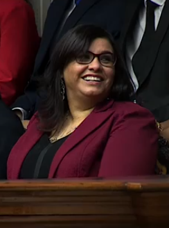 Primera Dama del Perú